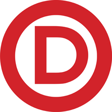 Danseinformasjonens logo. Design: Lise With Hansen